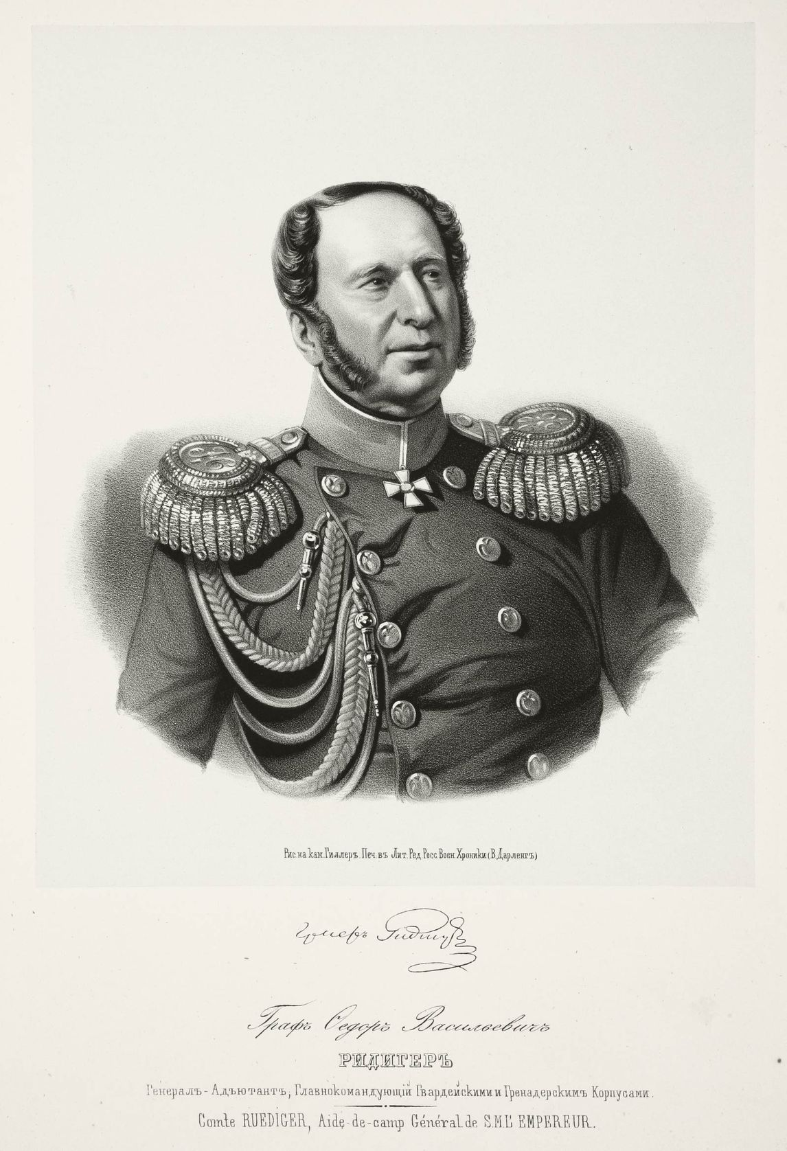 Граф (1847) Фёдор Васильевич Ридигер (12 декабрь 1783 — 11 июня 1856) — генерал-адъютант, генерал от кавалерии русской императорской армии. В 1849 г. принял капитуляцию венгерских повстанцев, чем завершил войну в Венгрии. В 1853-55 гг. на временной основе занимал должность наместника Царства Польского.